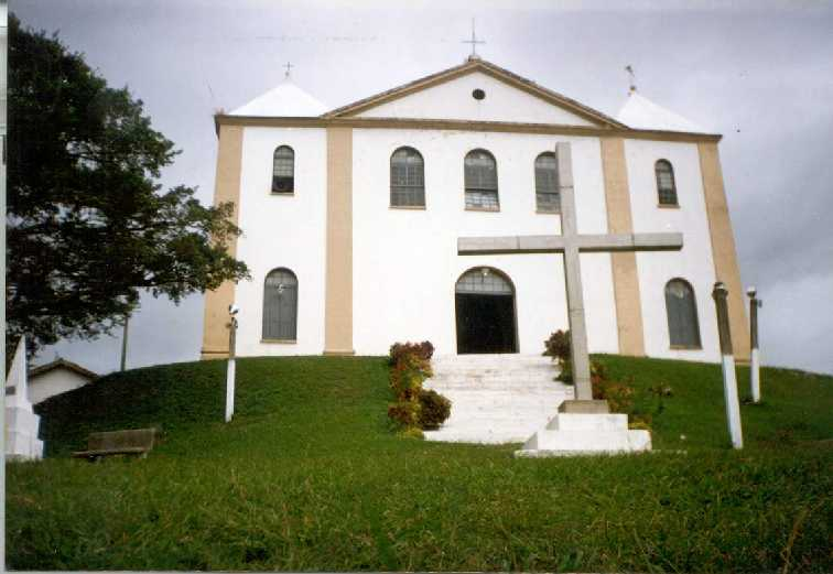 foto da fachada da Igreja do Senhor Bom Jesus do Socorro no Distrito de Pescaria Brava - SC